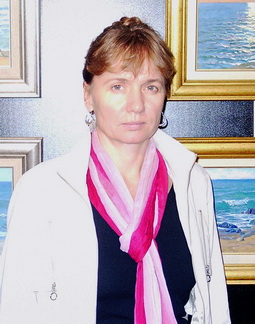 Белых Любовь Алексеевна, Член Союза художников СССР, почетный член Российской академии художеств.